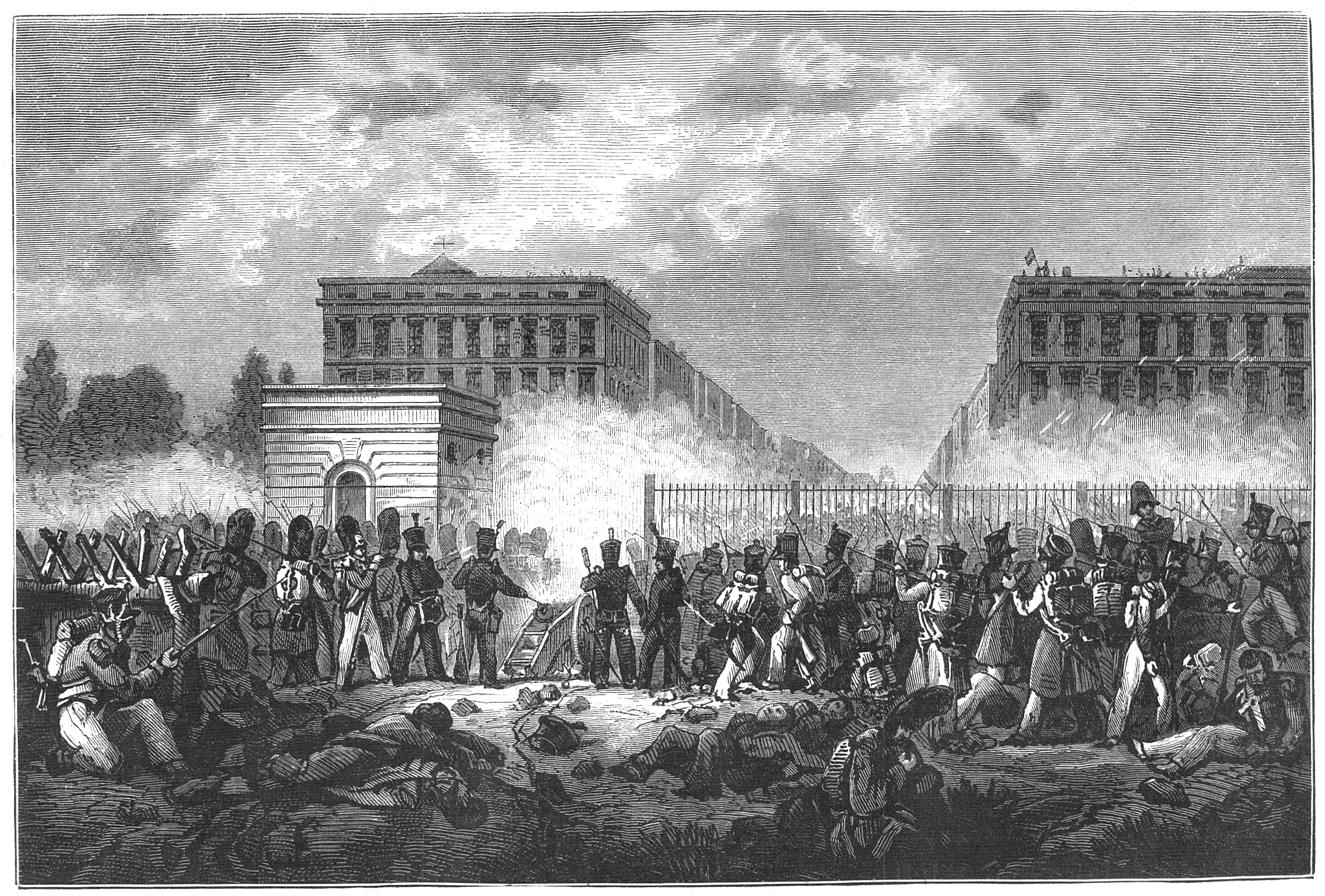 Révolution belge de 1830 — Attaque de la porte de Schaerbeek par les troupes hollandaises.